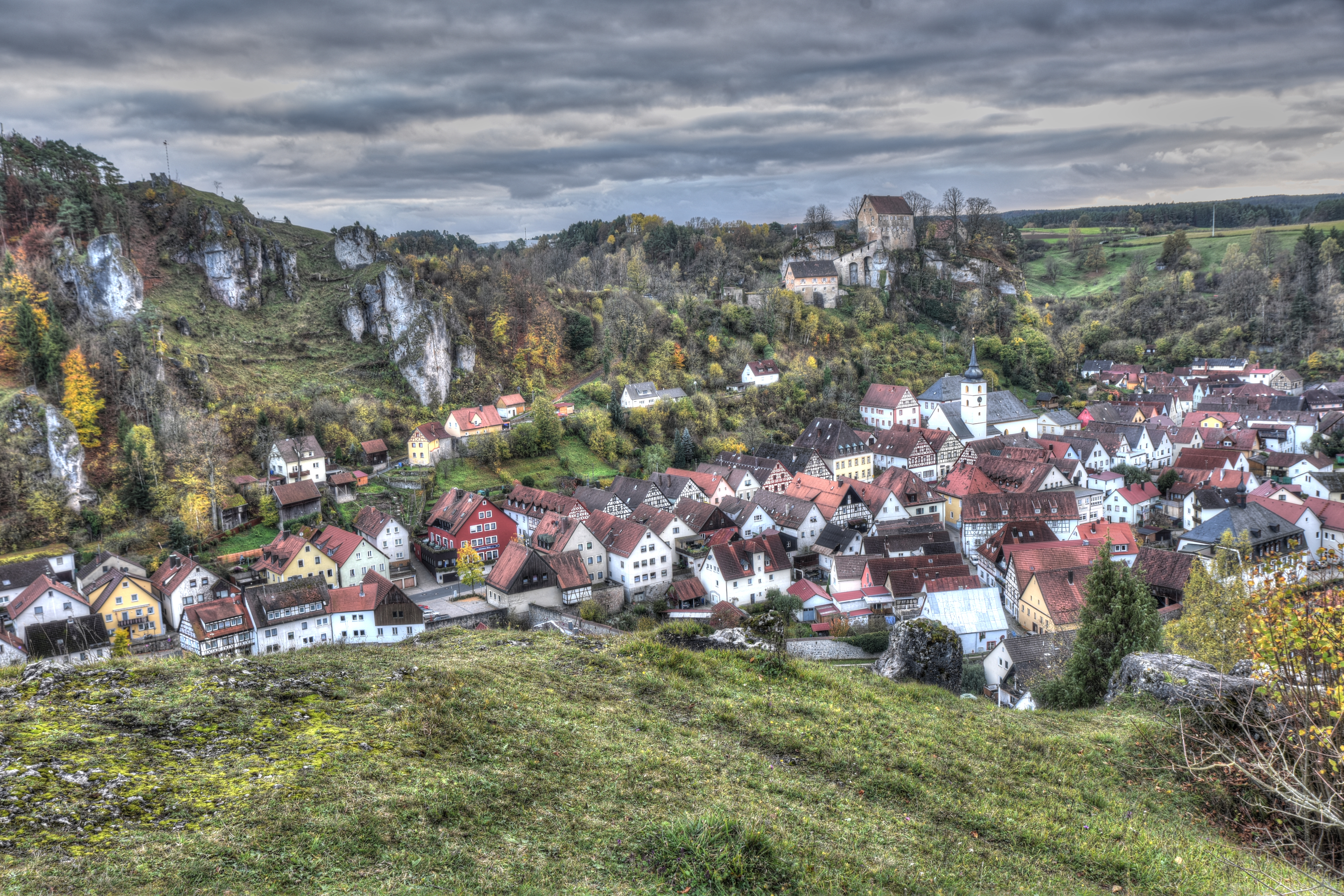 Ansicht von Pottenstein